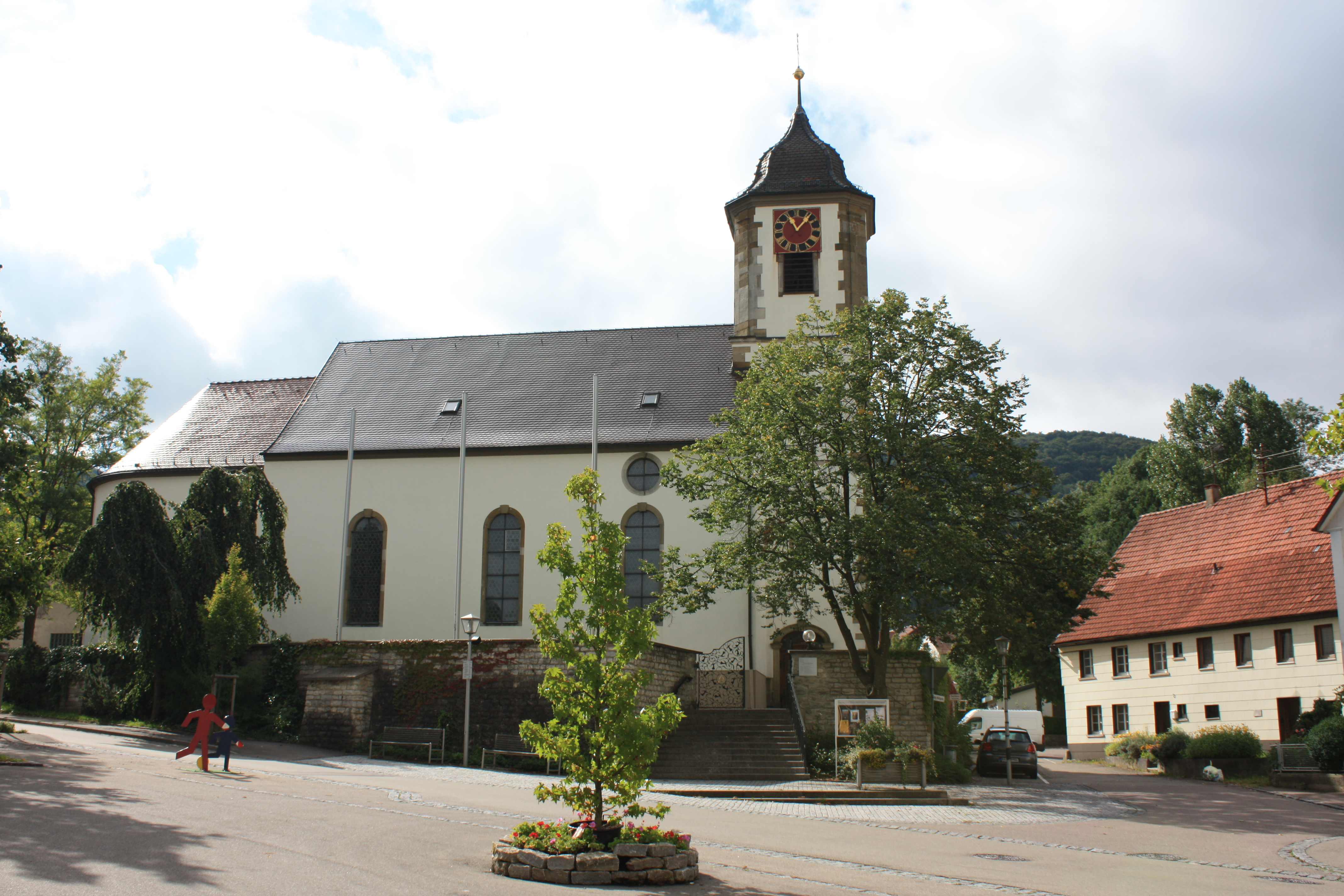 Heubach, Stadtteil Lautern. Die Kirche Mariä Himmelfahrt in Lautern